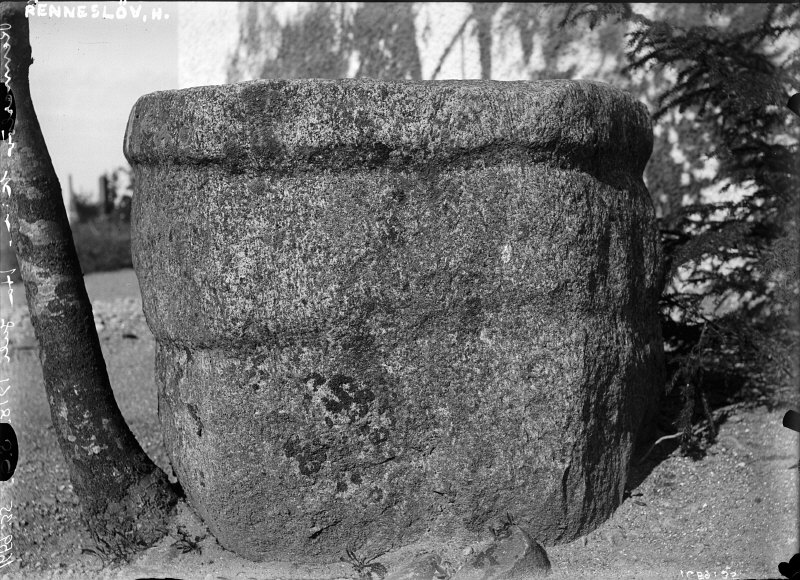 Dopfunt, romansk, före 1100-tal (?). Snabbinv. Kategori: (04) DopfuntarDopfunt, romansk, före 1100-tal (?). Snabbinv.